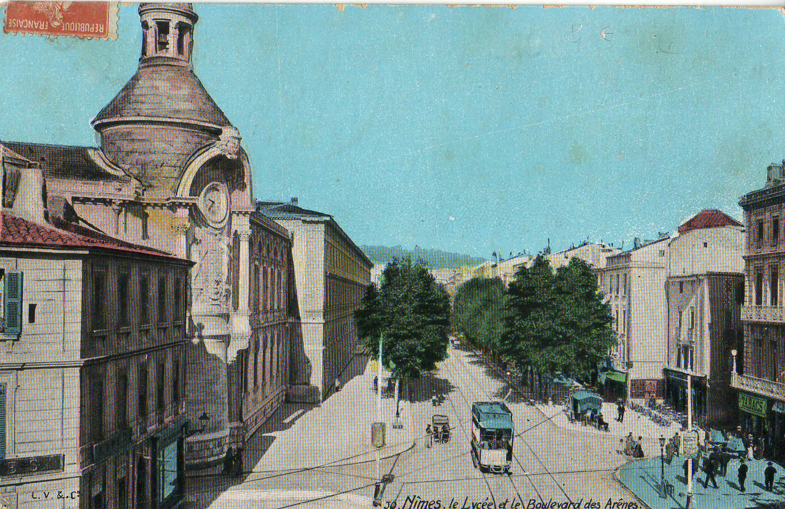 Carte postale ancienne éditée par L. V. et Cie, n°30 :NÎMES - Le Lycée et le Boulevard des Arènes